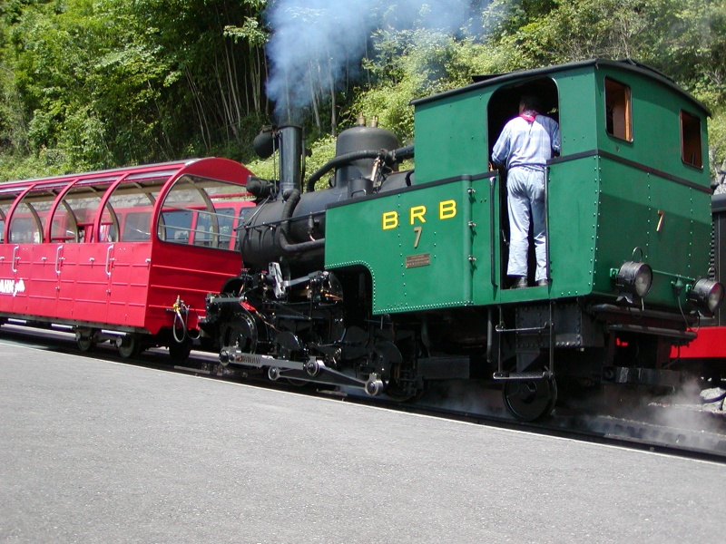 Brienz